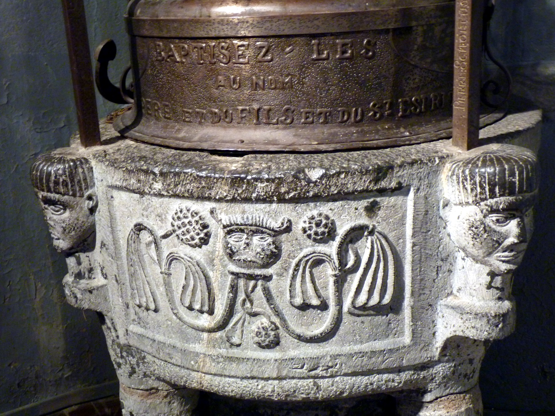 Bastogne. Église Saint-Pierre. Fonts baptismaux